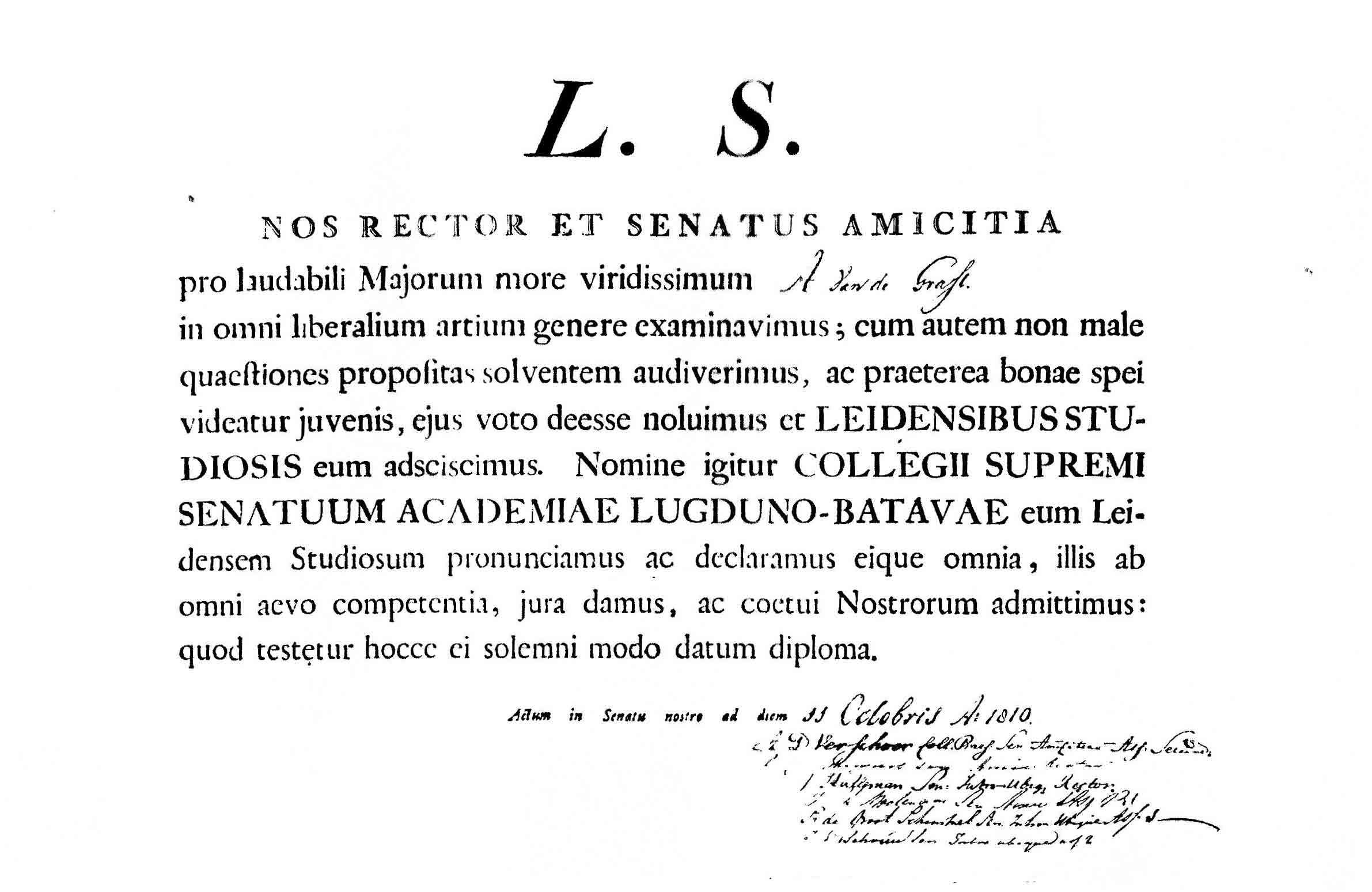 Bul Minervae Sacrum